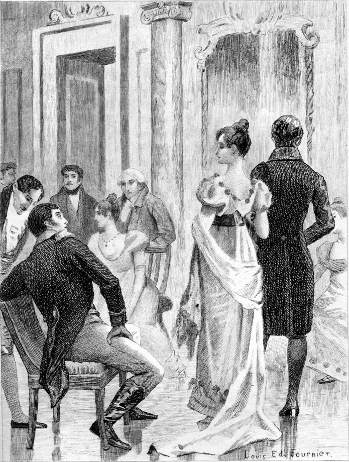 Title page of Honoré de Balzac's Ferragus (1833).